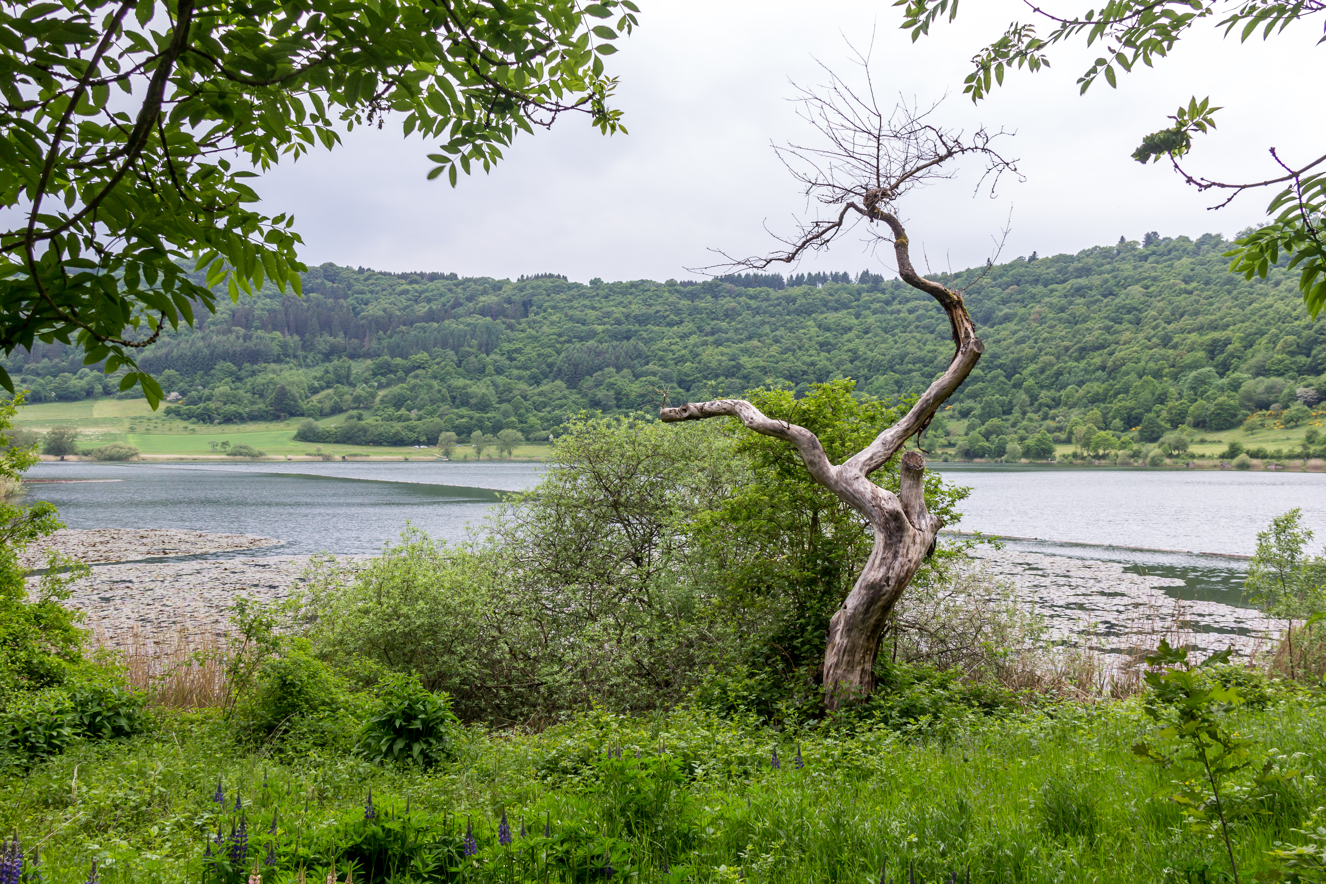 Meerfelder Maar. Naturschutzgebiet (Kennung: 7231-054)